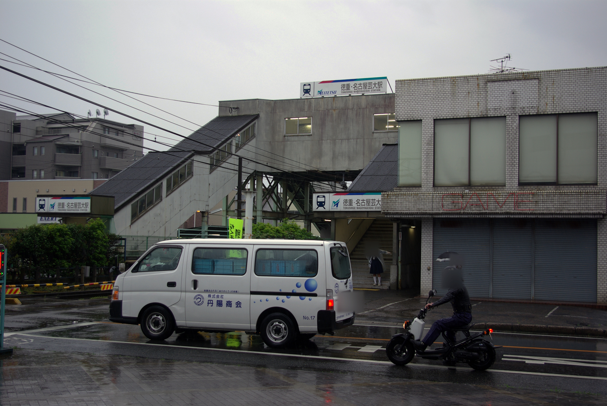 名鉄犬山線徳重・名古屋芸大駅